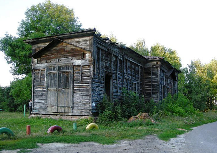 Церковь Димитрия Солунского, с. Дмитриевка Шебекинского района Белгородской области. Год постройки: 1878